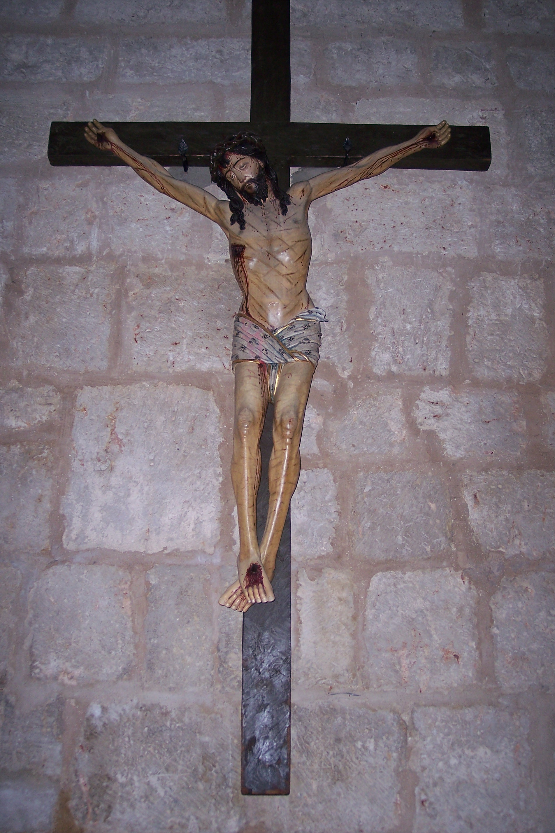 Cristo crucificado de Alejo de Vahía. Situado en la iglesia de San Francisco, Palencia. Fechado hacia 1500.